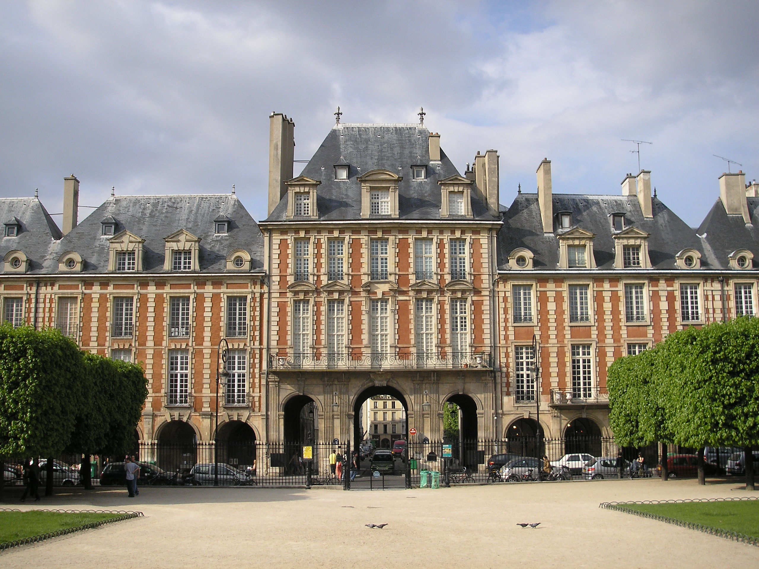 Place des Vosges in Paris, the Pavillion de la Reine.